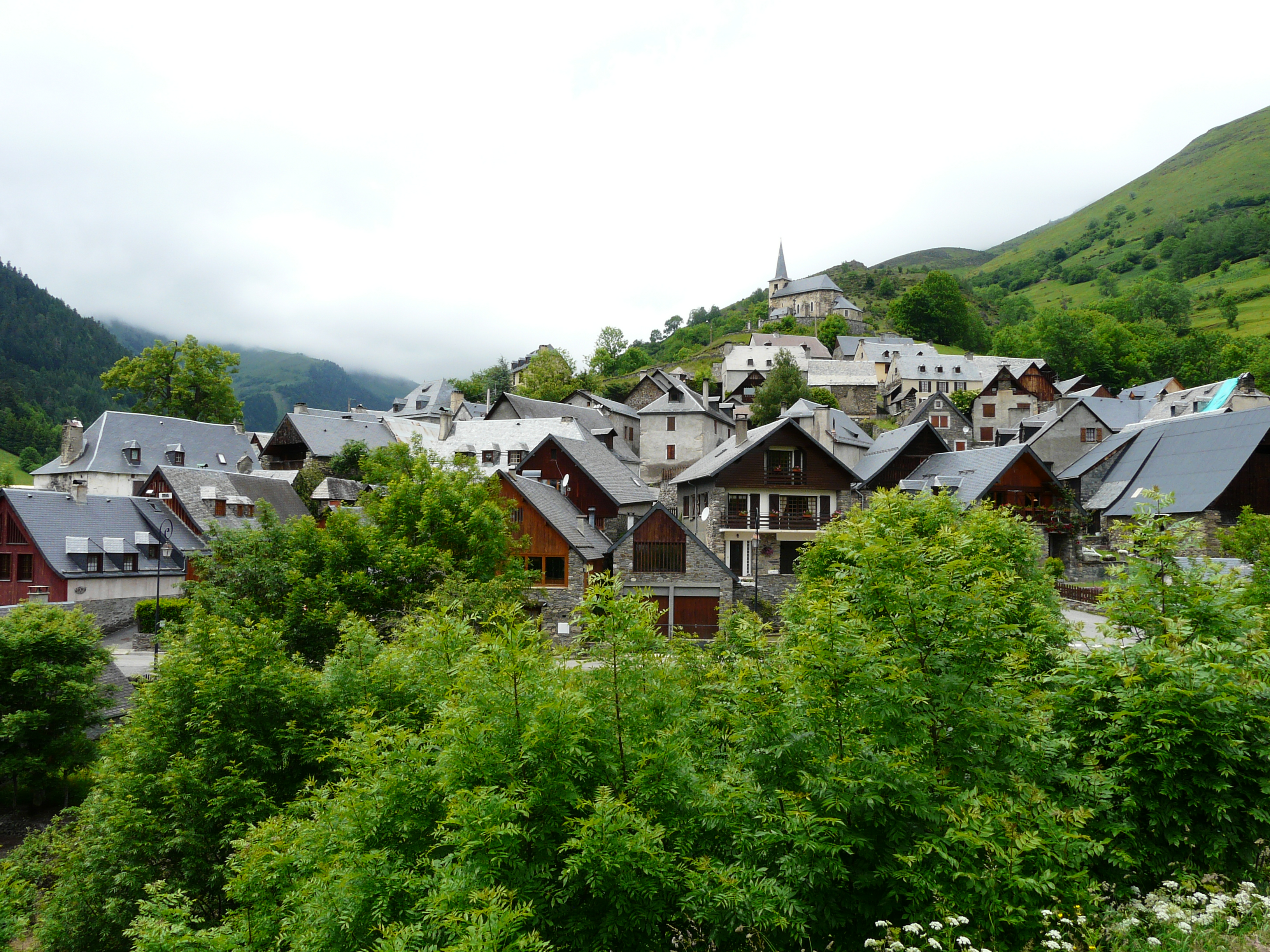 Le village de Cirès vu depuis le sud-est,Haute-Garonne, France.